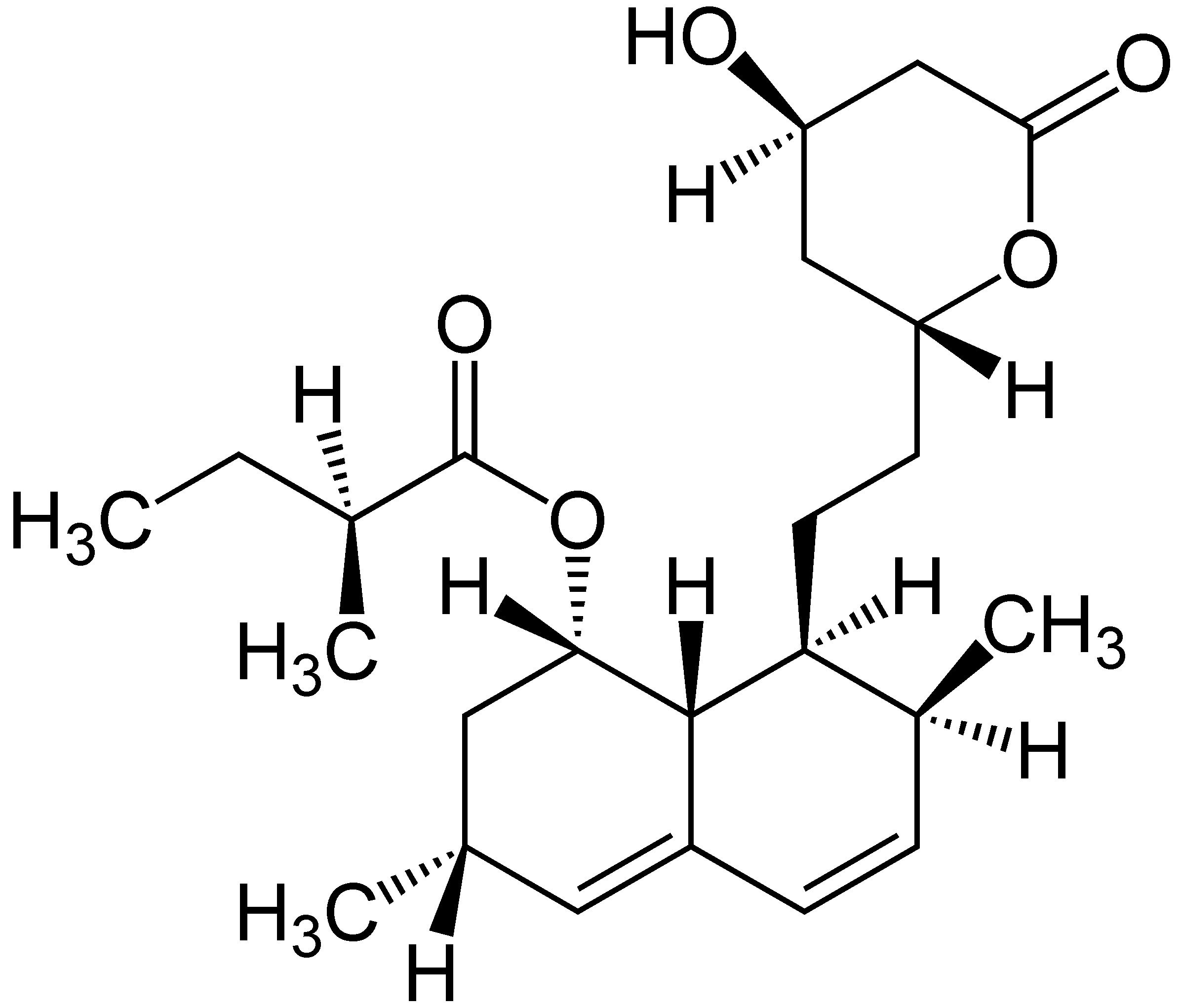 Lovastatin-Strukturformel mit präziser Stereochemie